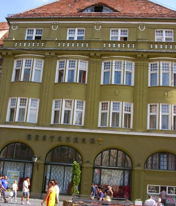 Hotel Coroana in Braşov